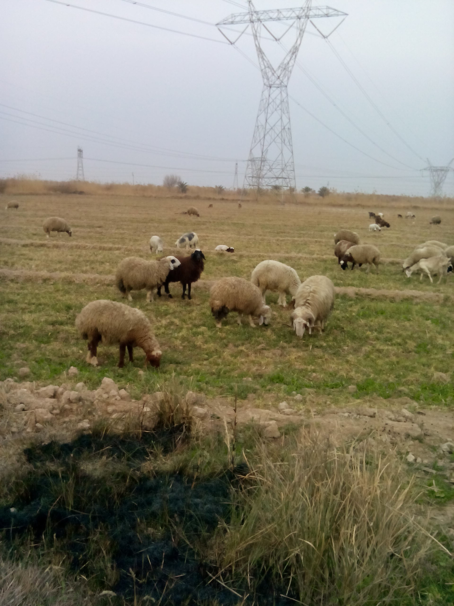 مجموعة من الاغنام تأكل العشب في قضاء الخالص بمحافظة ديالى شرق العراق